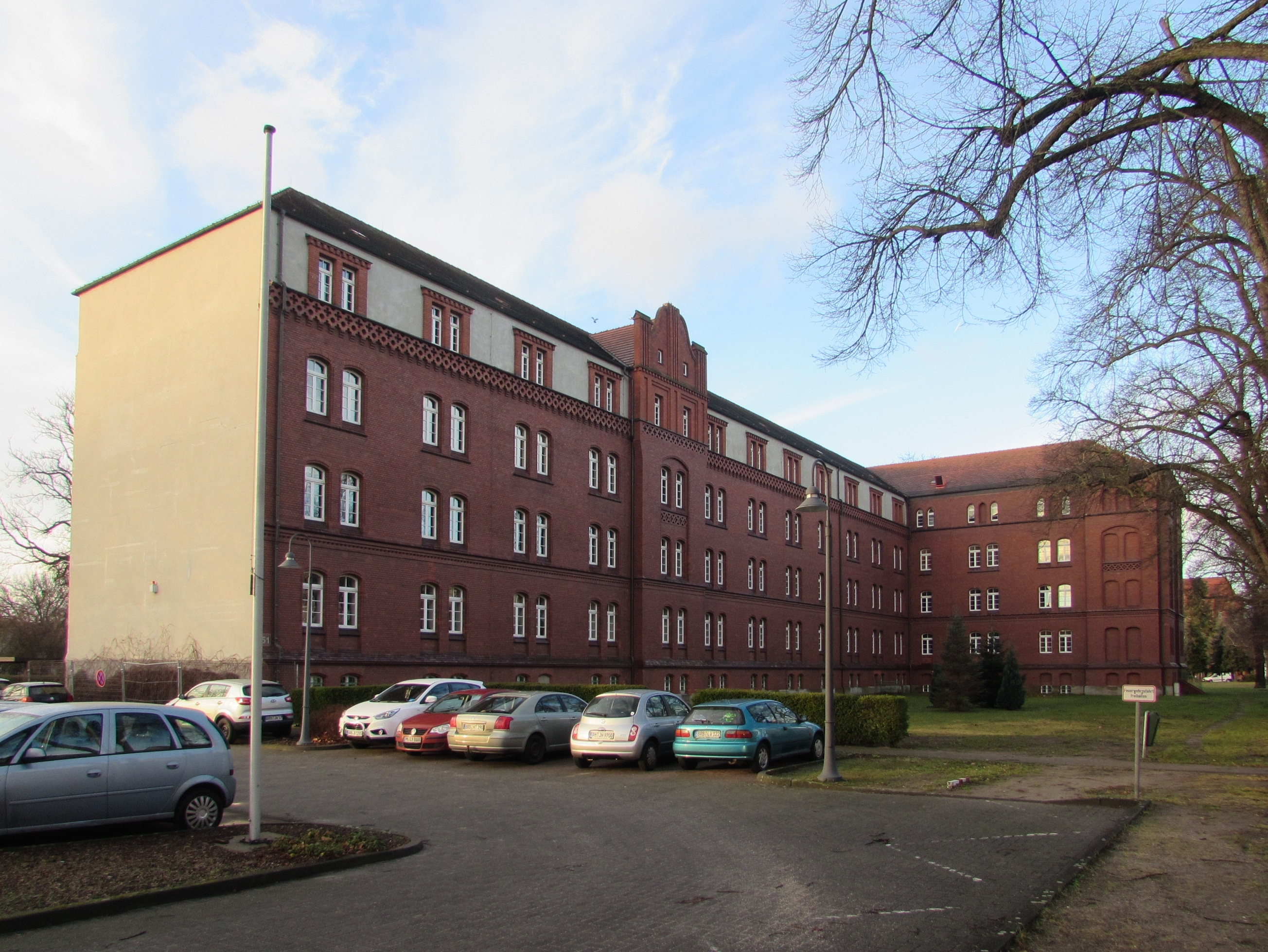 landesbehördenhaus, arbeitsgericht brandenburg, ehemalige infaanterieaserne magdeburger straße